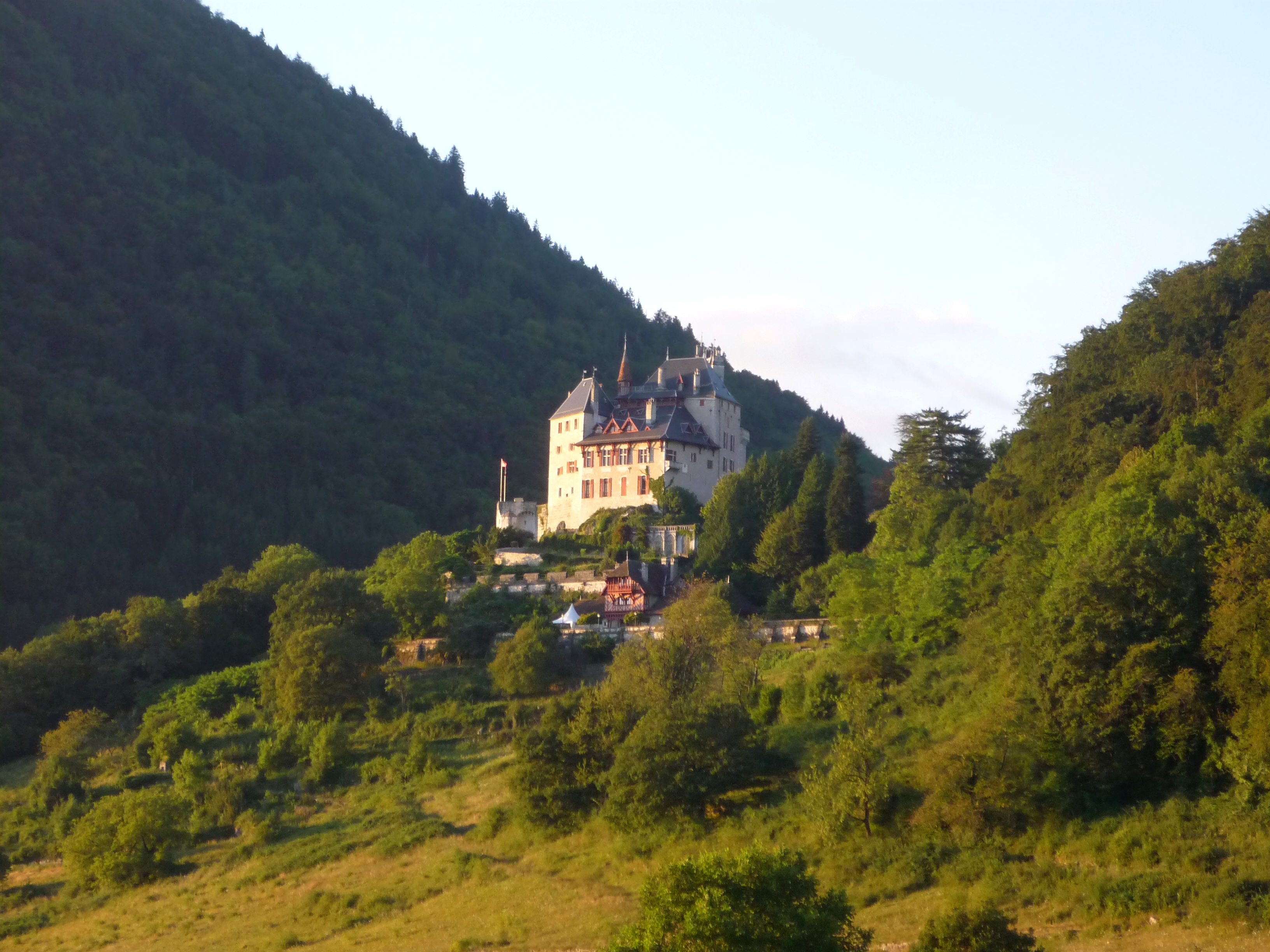 Château de Menthon-Saint-Bernard vu depuis Ramponnet, Menthon-Saint-Bernard, Haute-Savoie, France